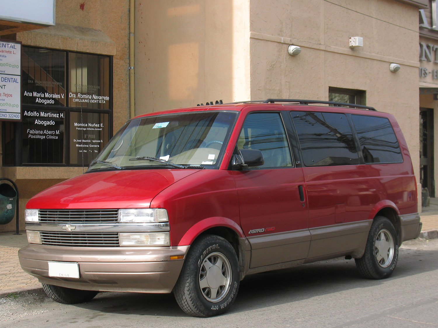 astro 1998